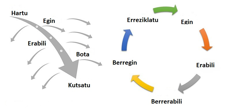 ekonomia zirkularra eta linealaren arteko alderaketa